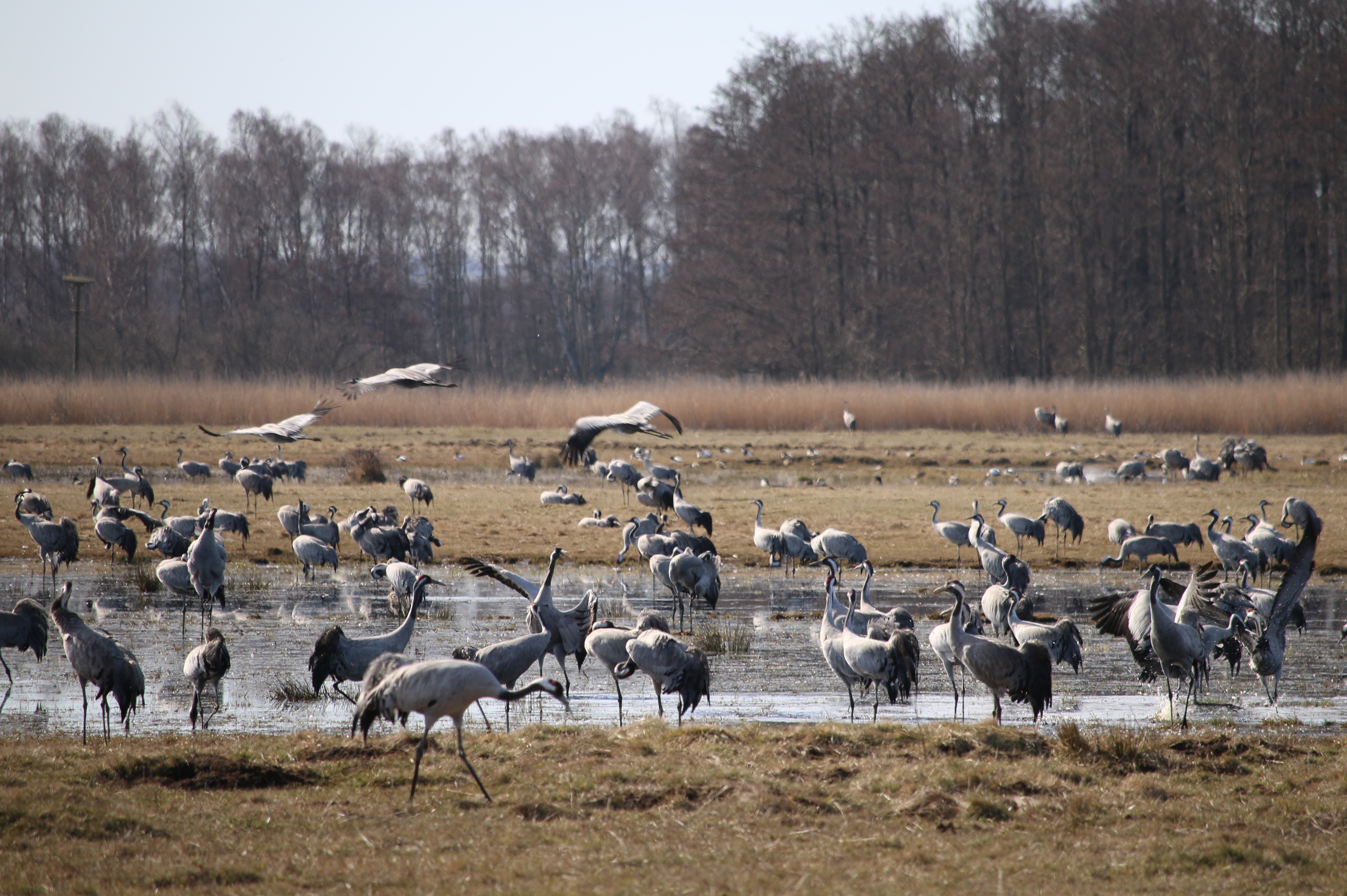 Tranor vid Pulken